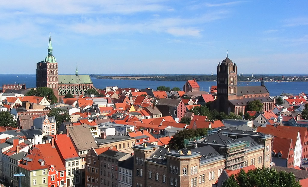 Beschreibung: St. Nikolai (left) & St. Jakobi Kirche, seen from Marienkirche Fotograf: Darkone, 10. September 2004